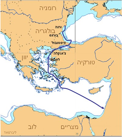 מסלול הפלגתה של הספינה ליברטאד